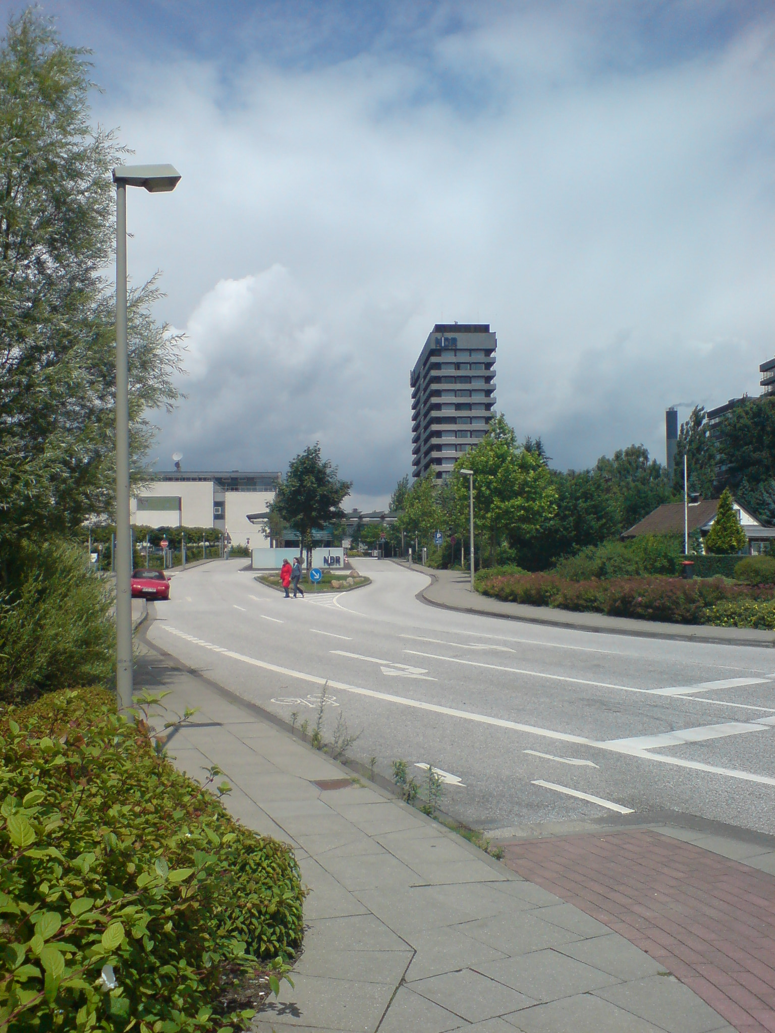 NDR-Fernsehen in Hamburg-Lokstedt